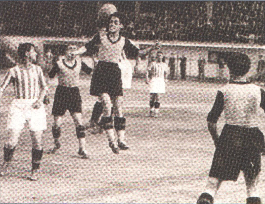 Τελικός Κυπέλλου Έλλαδας 1940, Παναθηναϊκός - Άρης